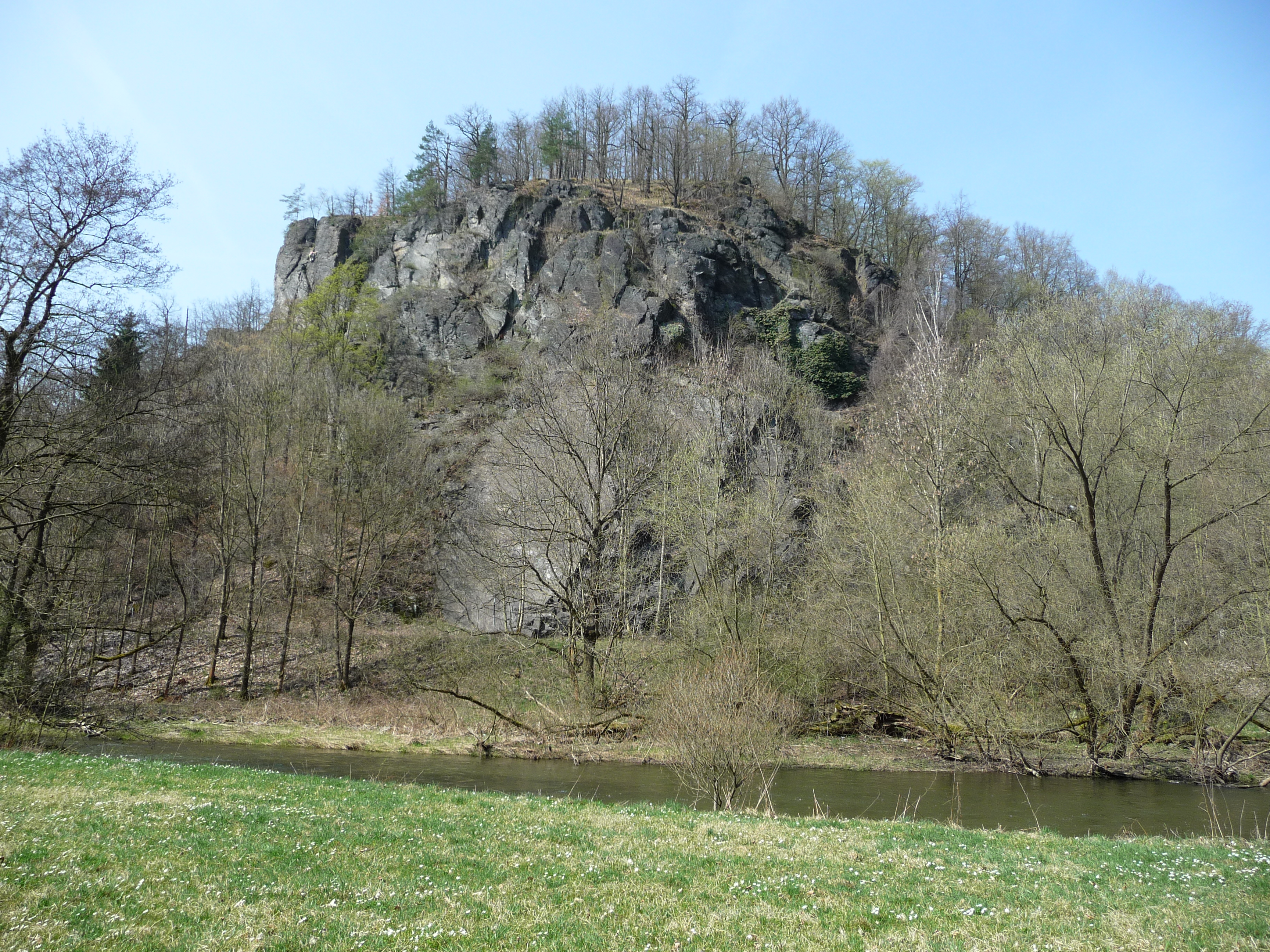 Blick über die Weiße Elster zum Nelkenstein – Vordergrund im NSG „Steinicht“ in Sachsen, Hintergrund im NSG „Steinicht“ in Thüringen (Landesgrenze hier auf thüringischer Seite entlang des Flussverlaufs)